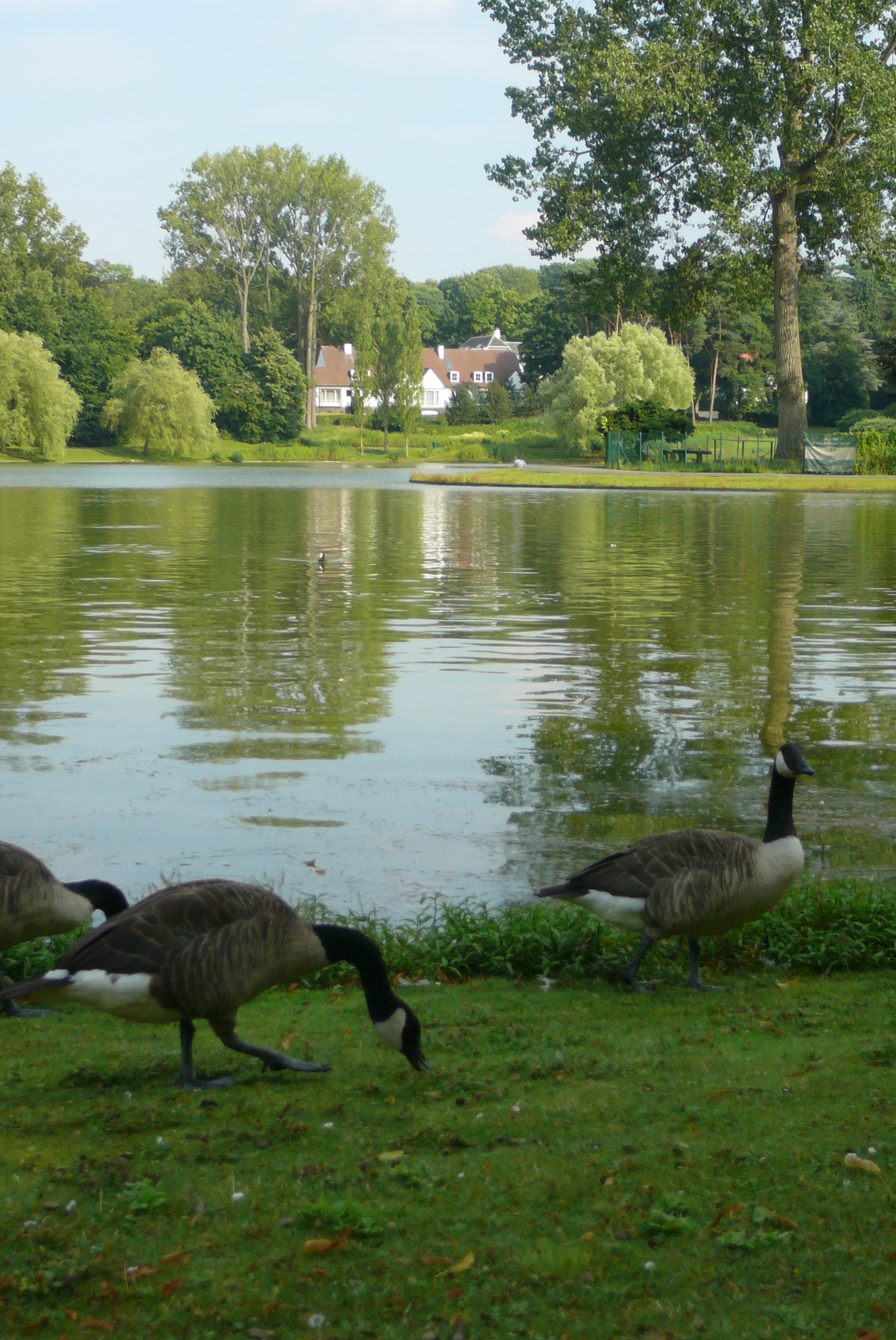 Vue des Étangs Mellaerts, à Woluwe-Saint-Pierre, en Région de Bruxelles-Capitale, Belgique